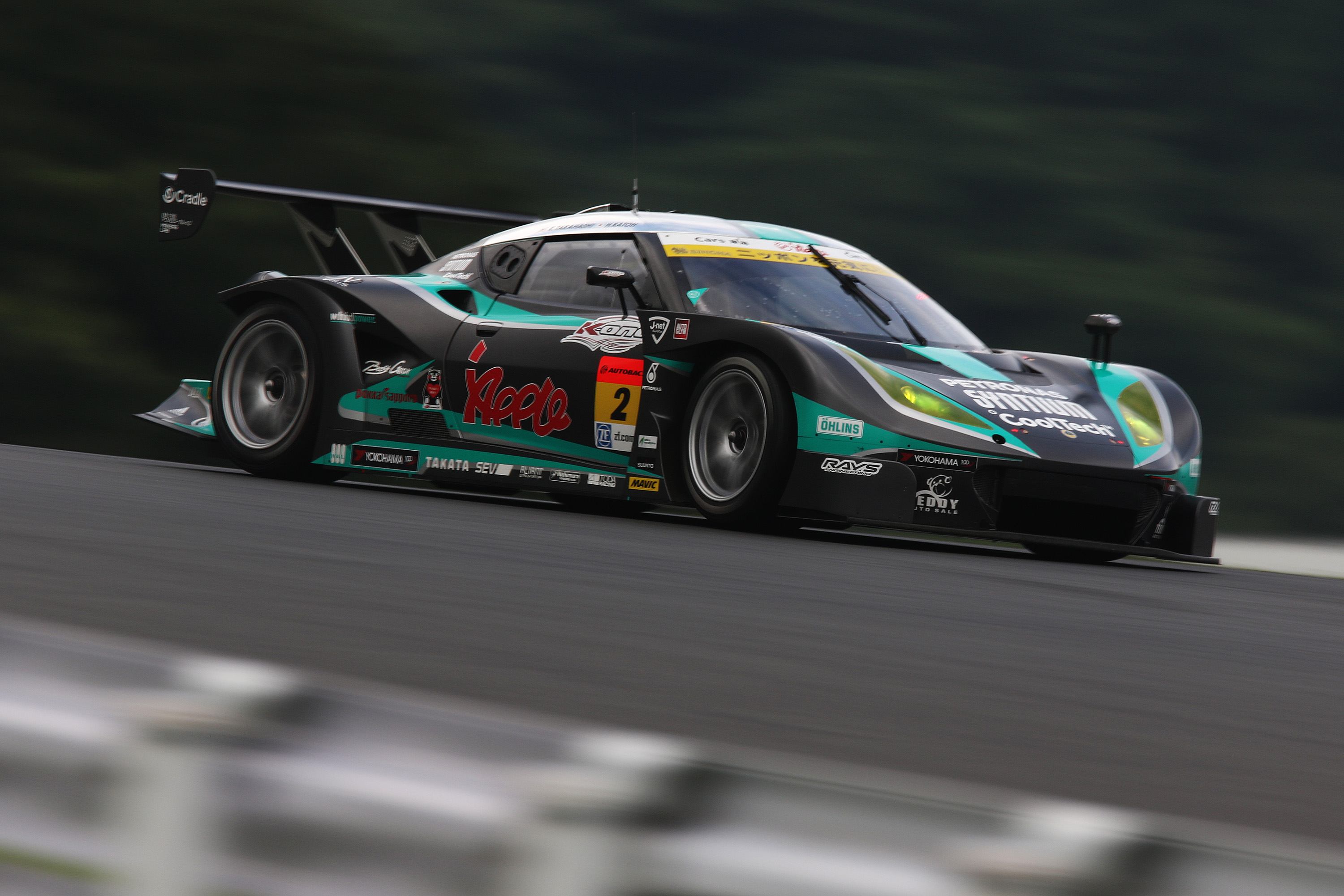 2017.8.5 SUPER GT Rd.5 Fuji Speedway Cars Tokai Dream28 2 シンティアム・アップル・ロータス [7D2_3985ks]